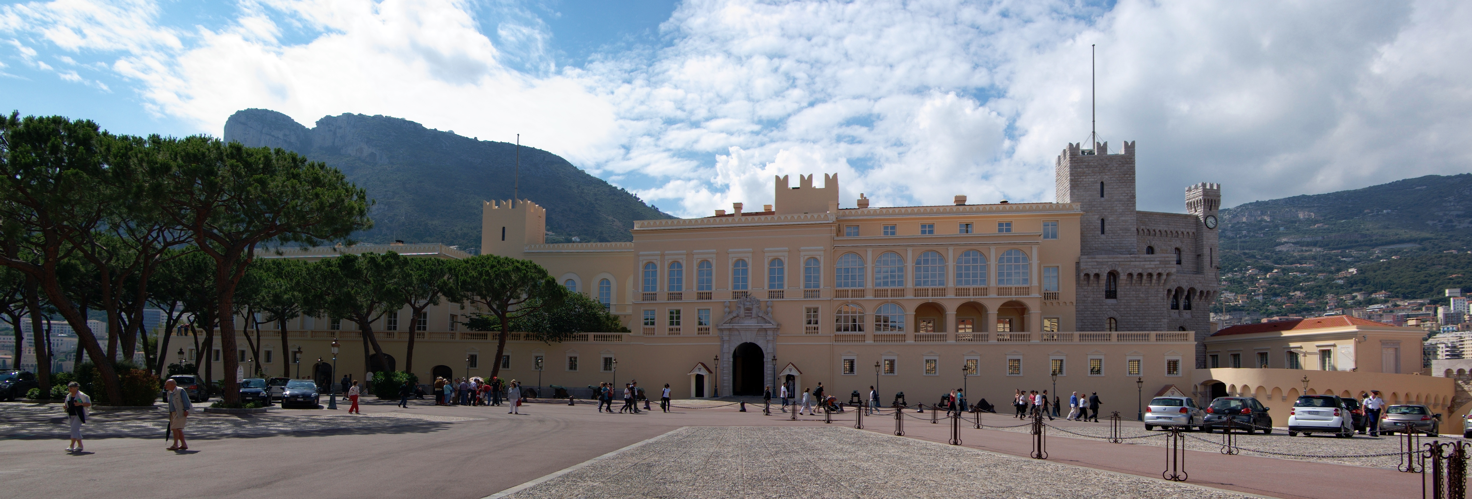 Palais Princier de Monaco